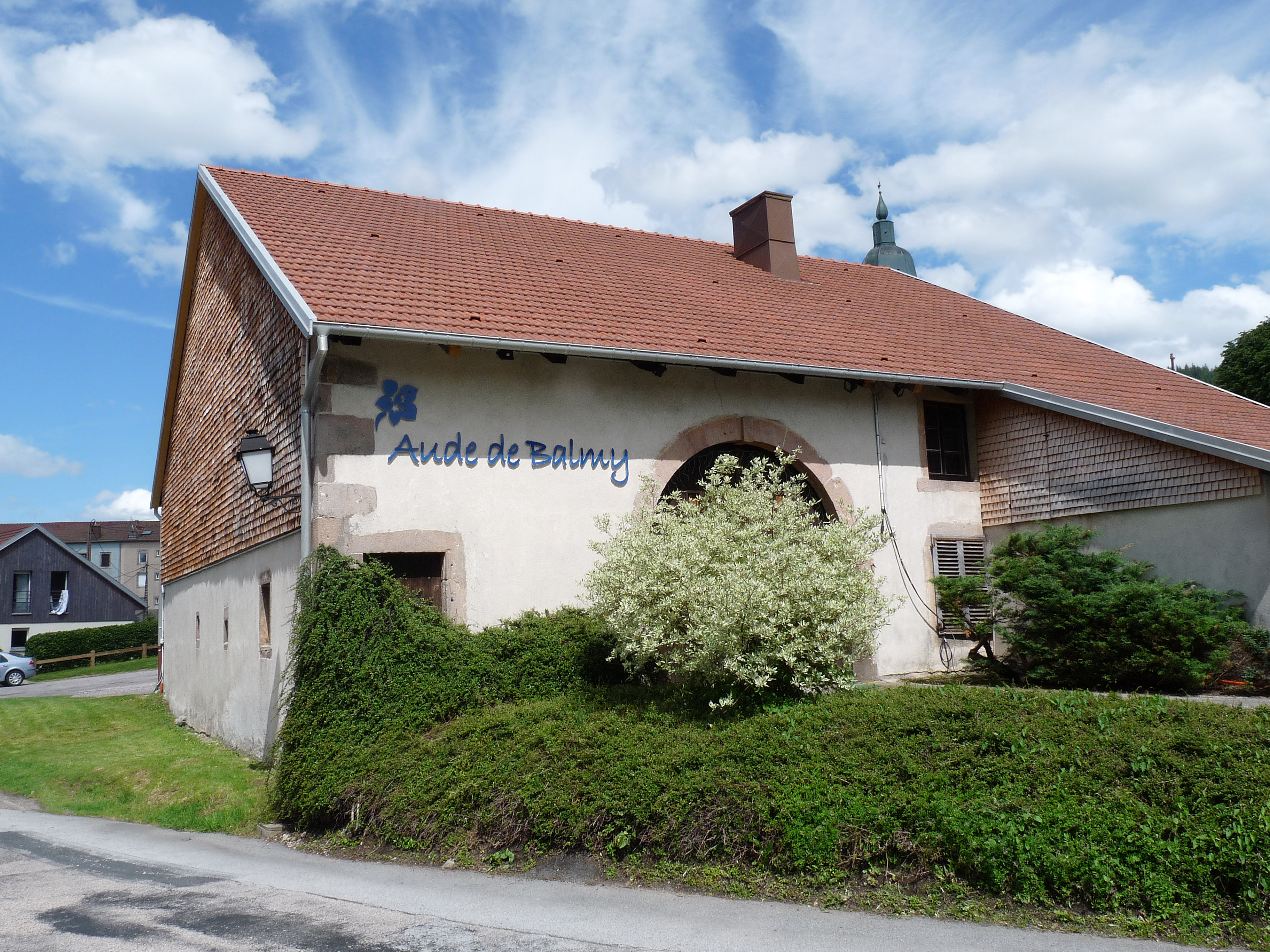 Gérardmer (Vosges) , 3 place de l'Eglise : ferme ancienne dite Immeuble Chevroton. Date : 1783. Inscrite aux Monuments historiques